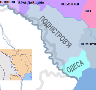 Див. Подністров'я (УНР). Мапу створено з File:UNR 1918 divisions-0.png, врізку з File:Locator map of Kyiv province.svg